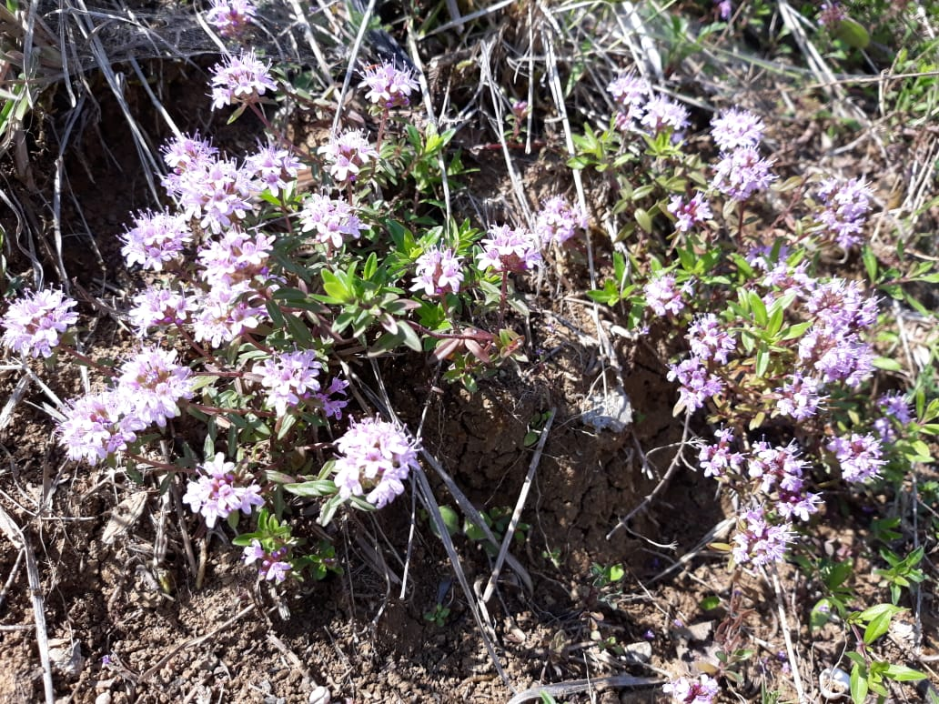 Lisra, bimë aromatike e përhapur në pjesën më të madhe të Shqipërisë